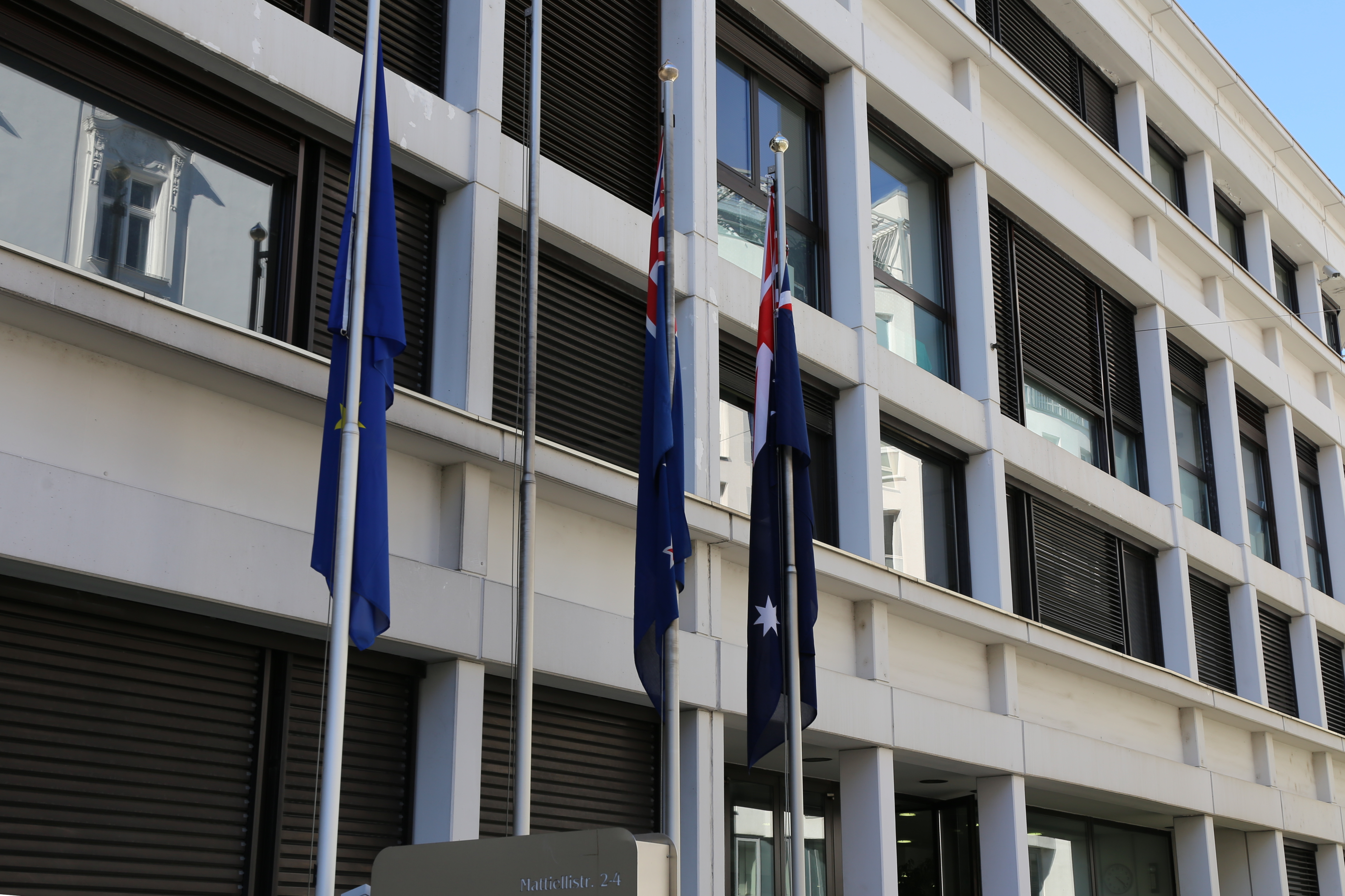 Ambassades d’Australie et de Nouvelle-Zélande à Vienne.